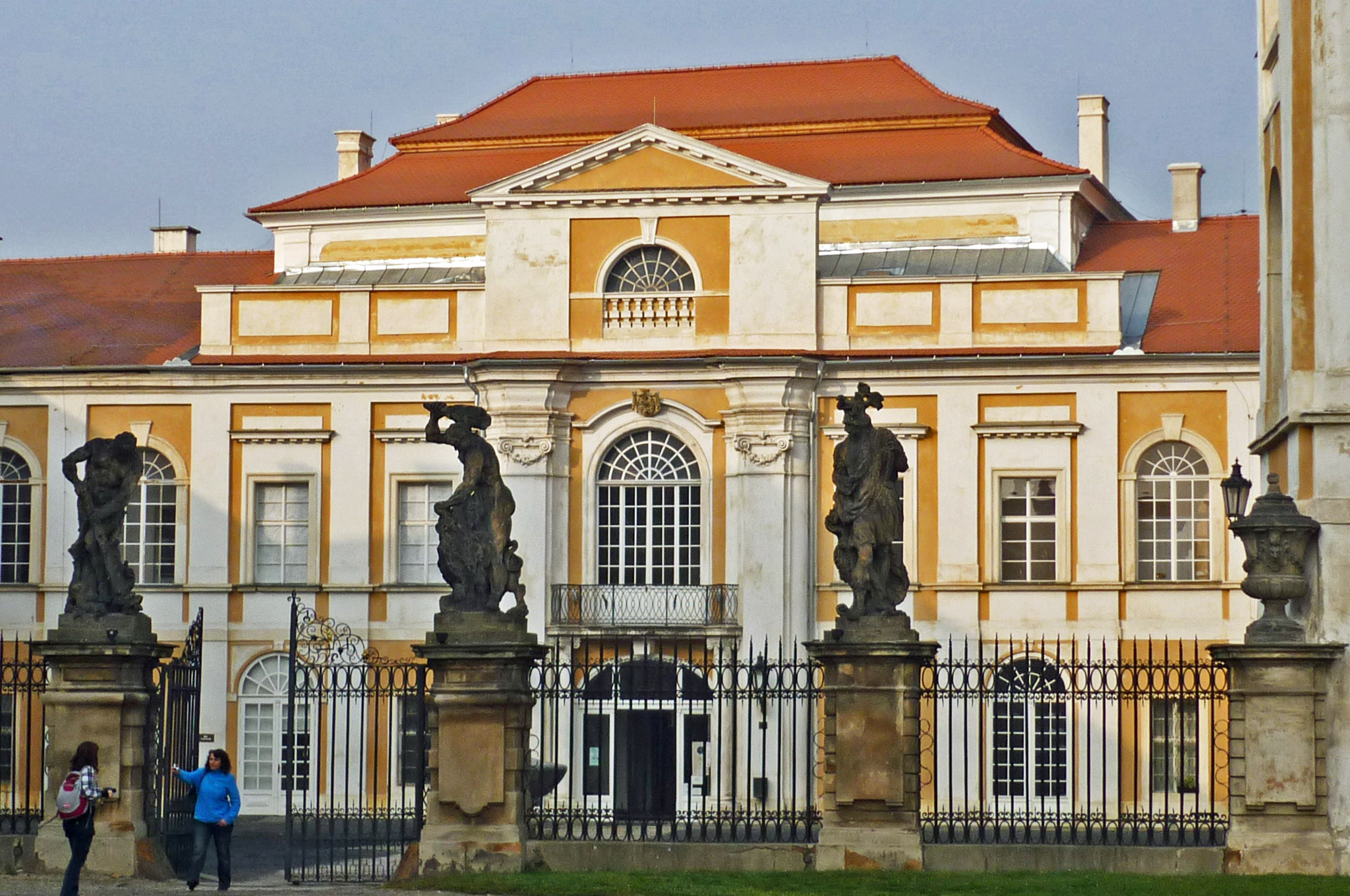 Schloss Dux (Duchcov) in Nordböhmen